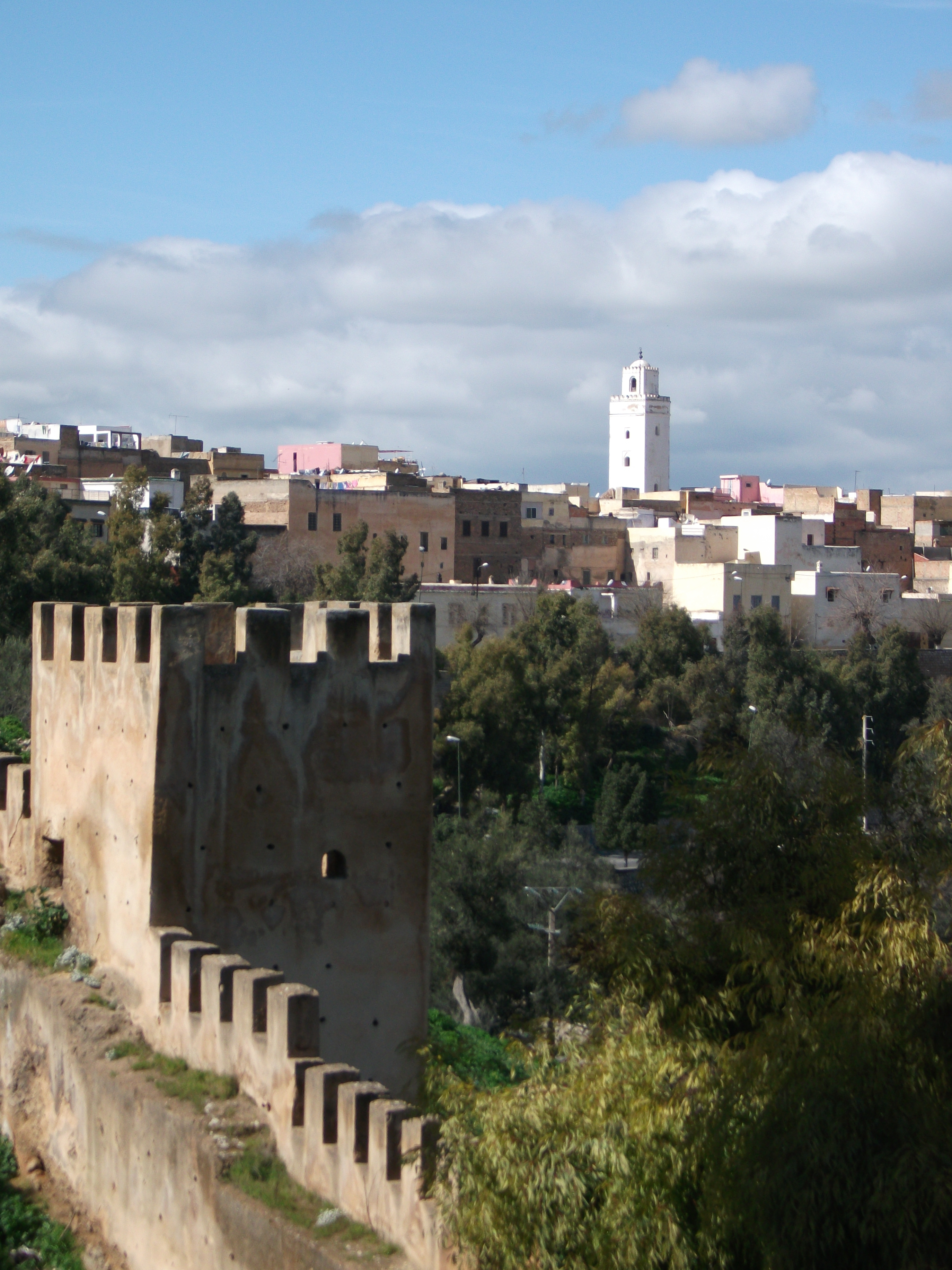 Taza 2011 (Stadtansicht)